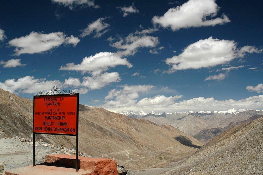 Kardung La.